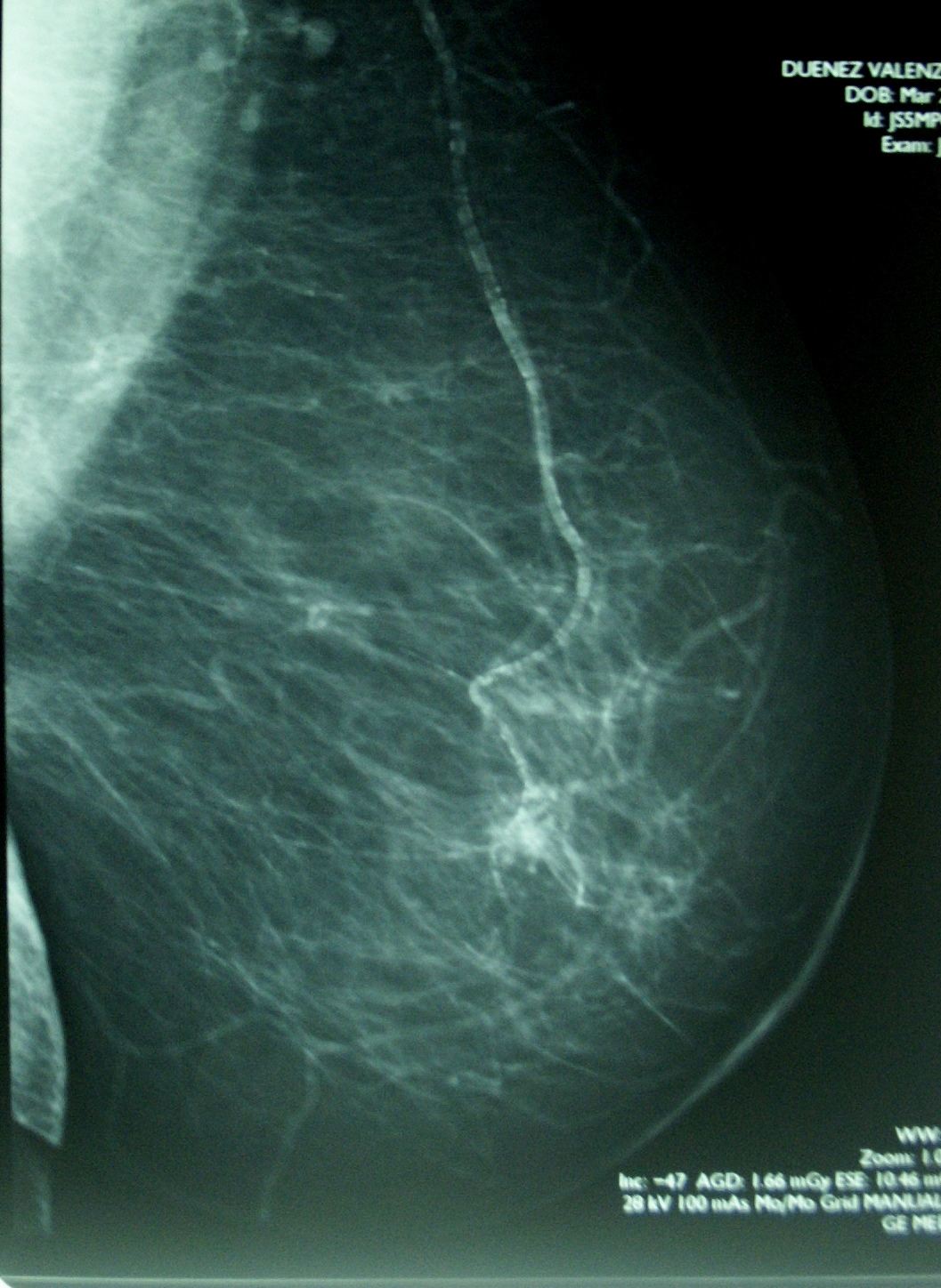 Mamografía BIRADS IV Poep